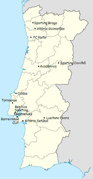 Carta dos clubes participantes do campeonato de portugal de futebol de primeira divisao 1958-1959